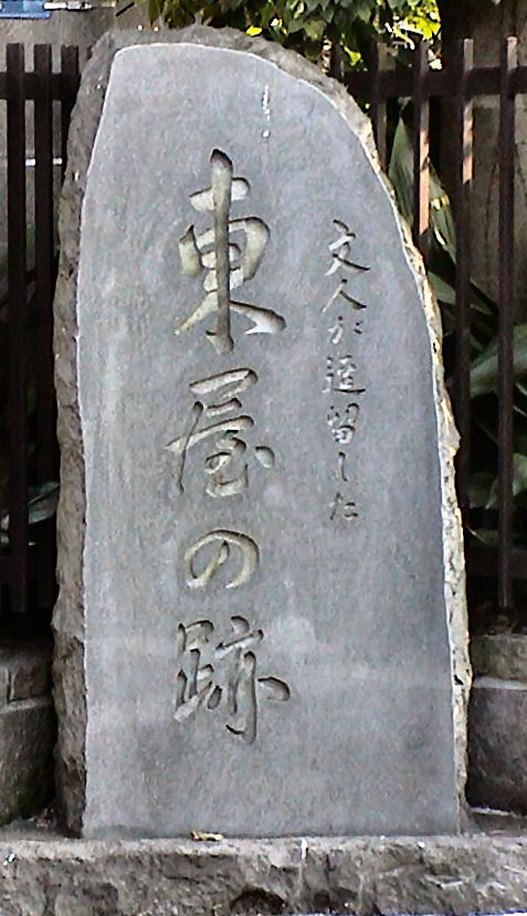 文人が逗留した 東屋の跡（佐江衆一揮毫）